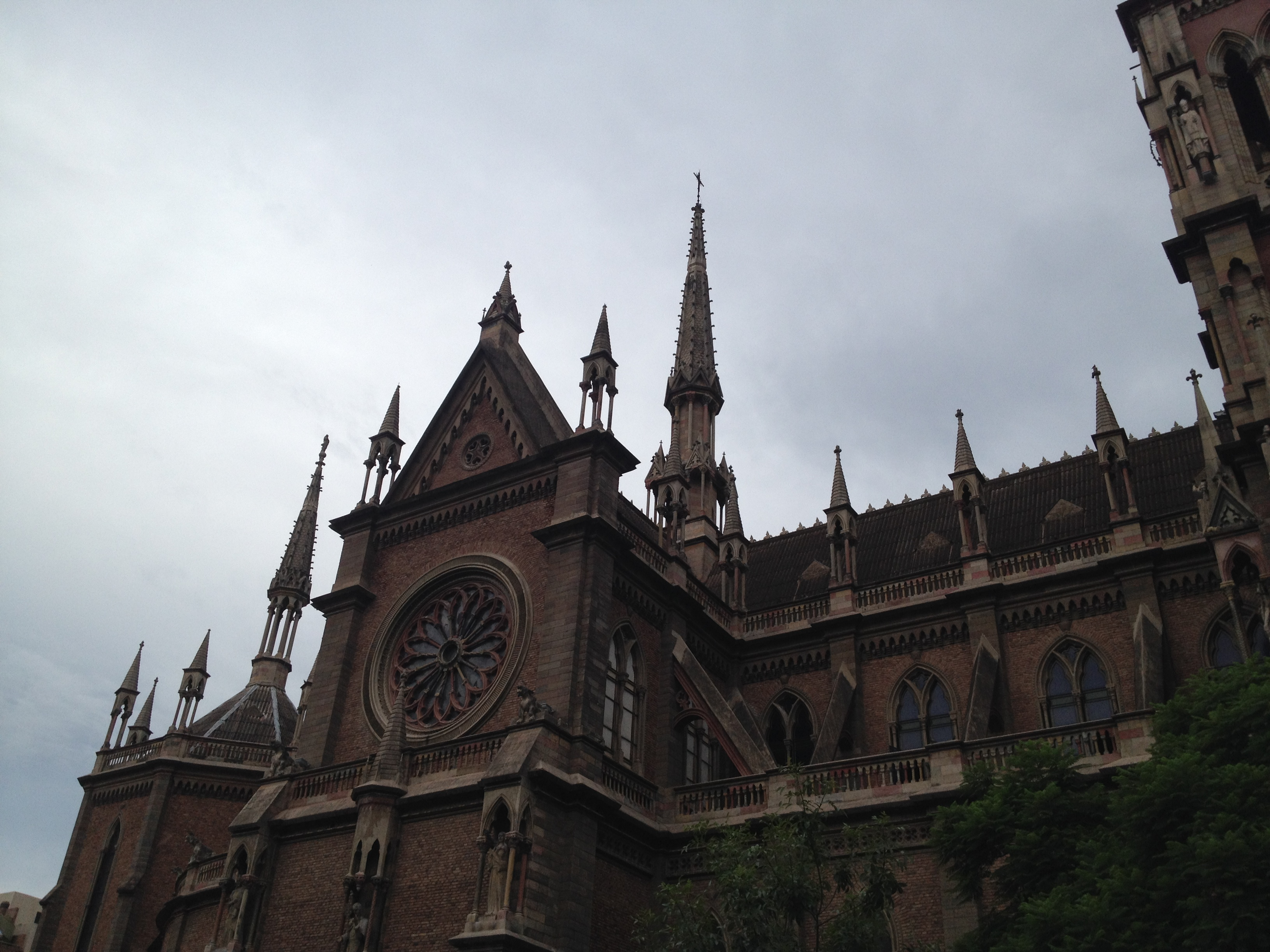 Iglesia del Sagrado Corazón/Iglesia de los Capuchinos, Ciudad de Córdoba.